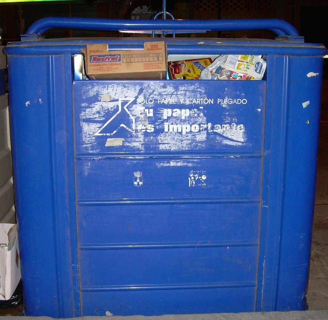 Contenedor de Papel, Alh. Torre, España Paper Recycling Container